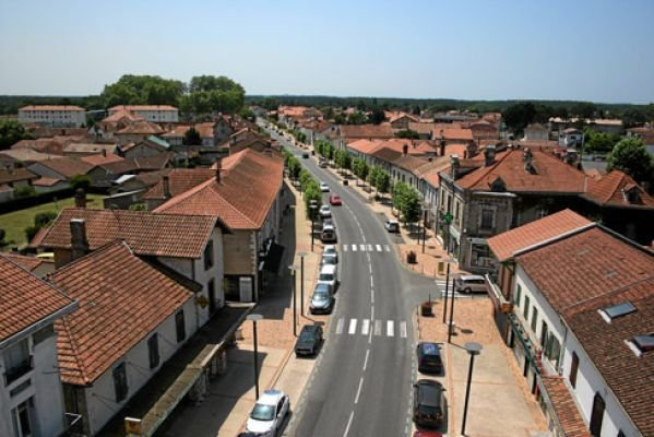 bourg